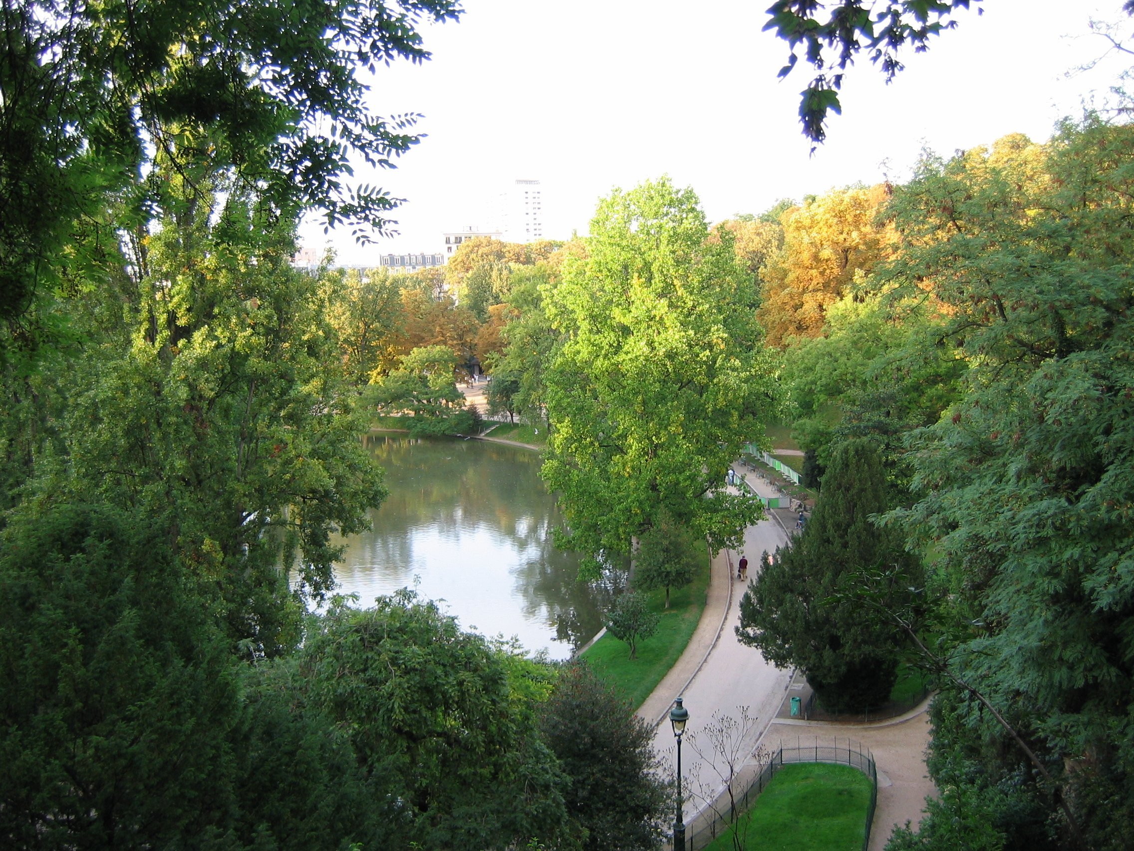 Description: Photo du Parc des Buttes-Chaumont (prise le 7 octobre 2004 vers 18h22) Source: Yann Grossel Licence: GFDL 2004 Yann Grossel